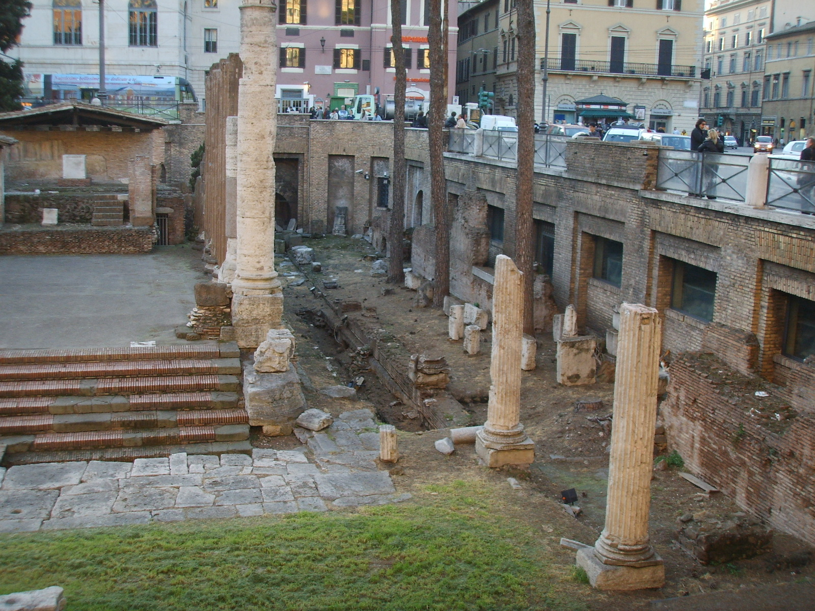 Il "Tempio A" dell'Area Sacra di Largo di Torre Argentina a Roma, risalente al III secolo a.C. Si ipotizza che corrisponda al tempio di Giuturna (ninfa delle fonti) o del tempio di Iunonis Curritis. Il primo fu fatto costruire da Quinto Lutazio Catulo dopo la vittoria dei romani contro Falerii nel 241 a.C.; il secondo da Quinto Lutazio Cercone a seguito della vittoria sui Falerii del suo parente Quinto Lutazio Cercone, sempre nel 241 a.C. L'identificazione più probabile è la prima. Su questo tempio venne costruita la chiesa di San Nicola dei Cesarini, di cui sono ancora presenti alcuni resti (come le absidi, ed un altare).